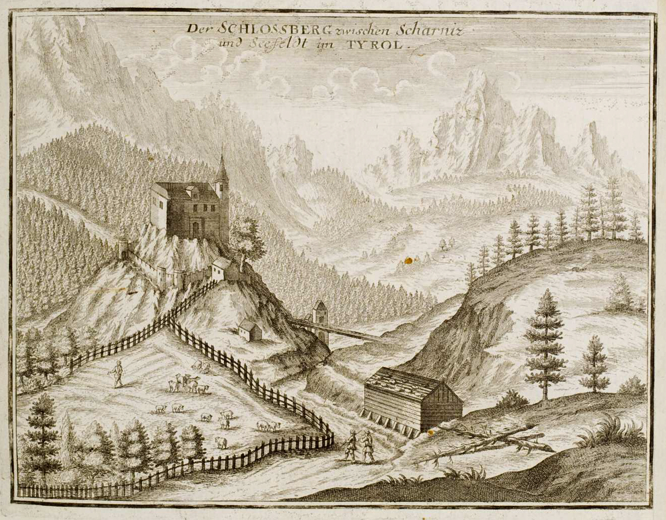 Curioses Staats und Kriegs Theatrum Dermahliger Begebenheiten im Tyrol : durch Unterschiedliche Geographische, Hydrographische, Topographische, Chronologische, Genealogische, Historische &c. Carten, Abrisse, und Tabellen Erlaeutert, Augspurg : Stridbeck, [ca. 1700] Schlossberg zwischen Scharniz und Seefeldt